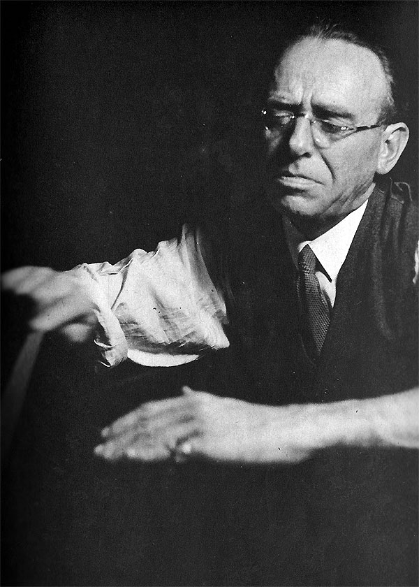 Nils Grevillius